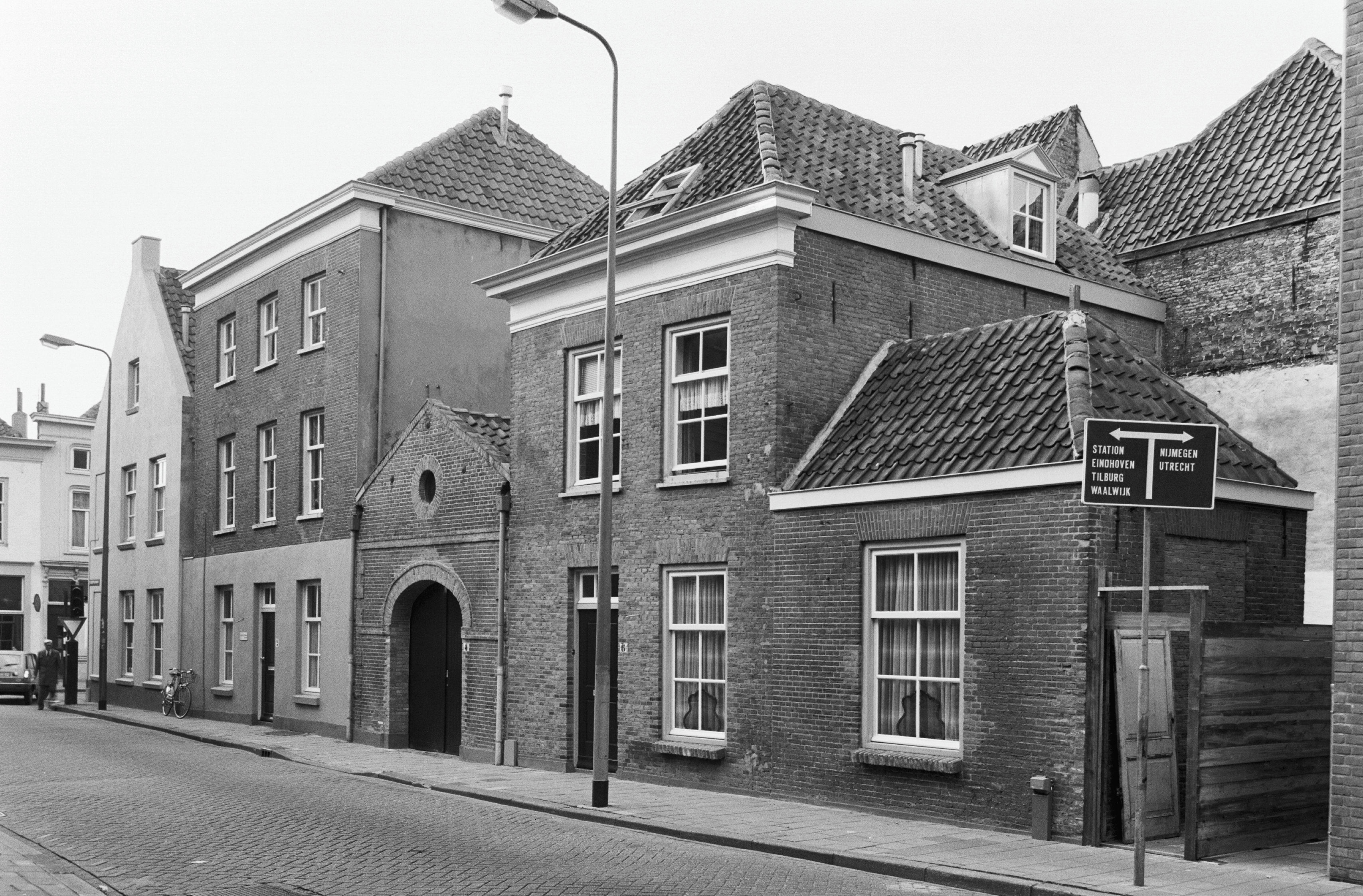 overzicht